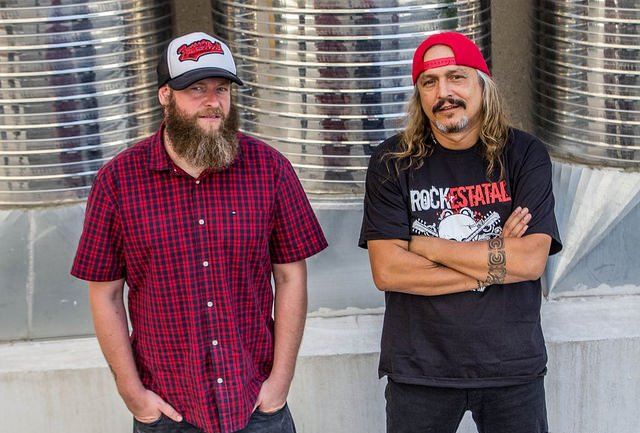 Ofunkillo en 2014